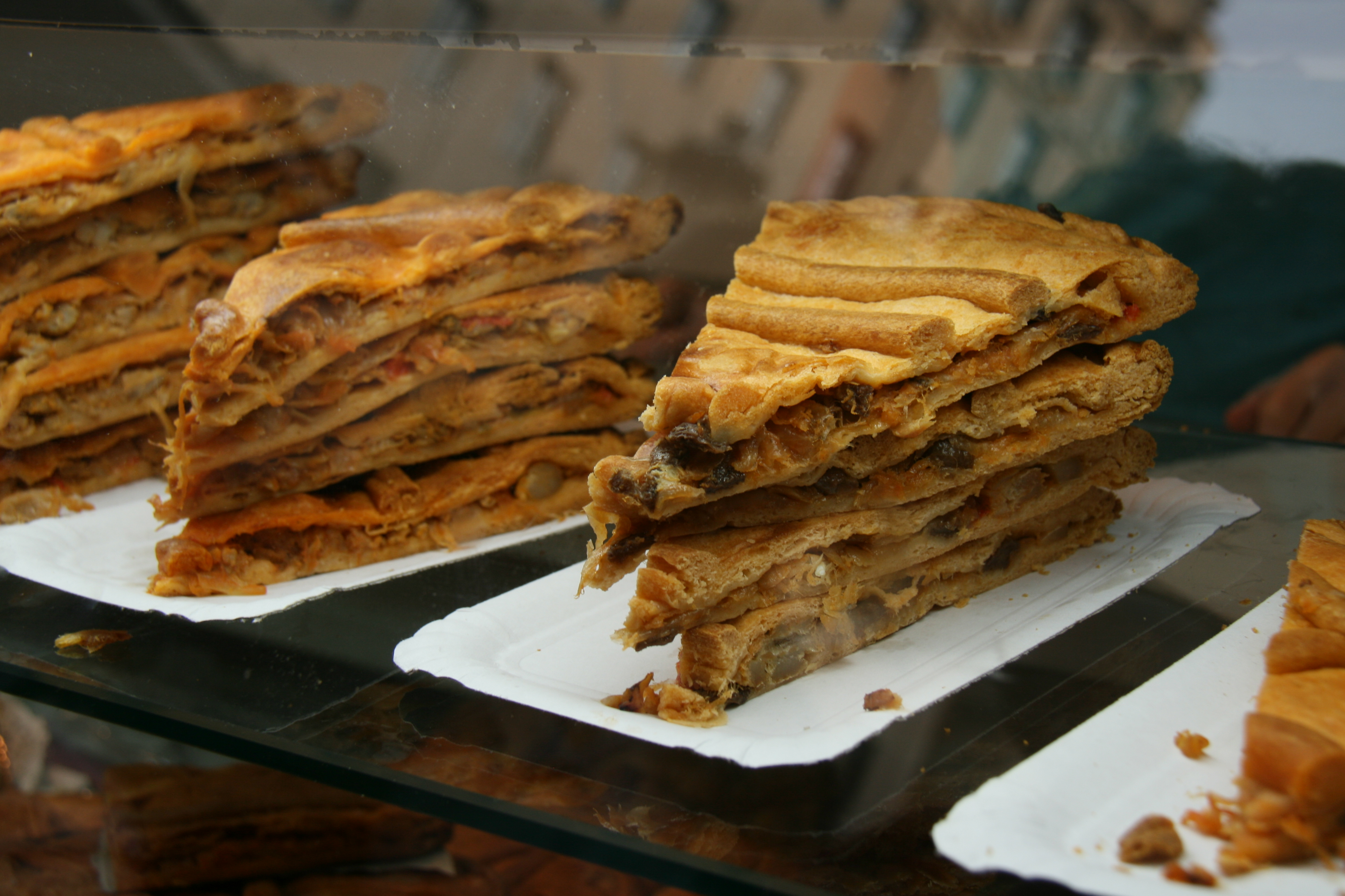 Empanadas de diversos contenidos - pulpo, bacalao